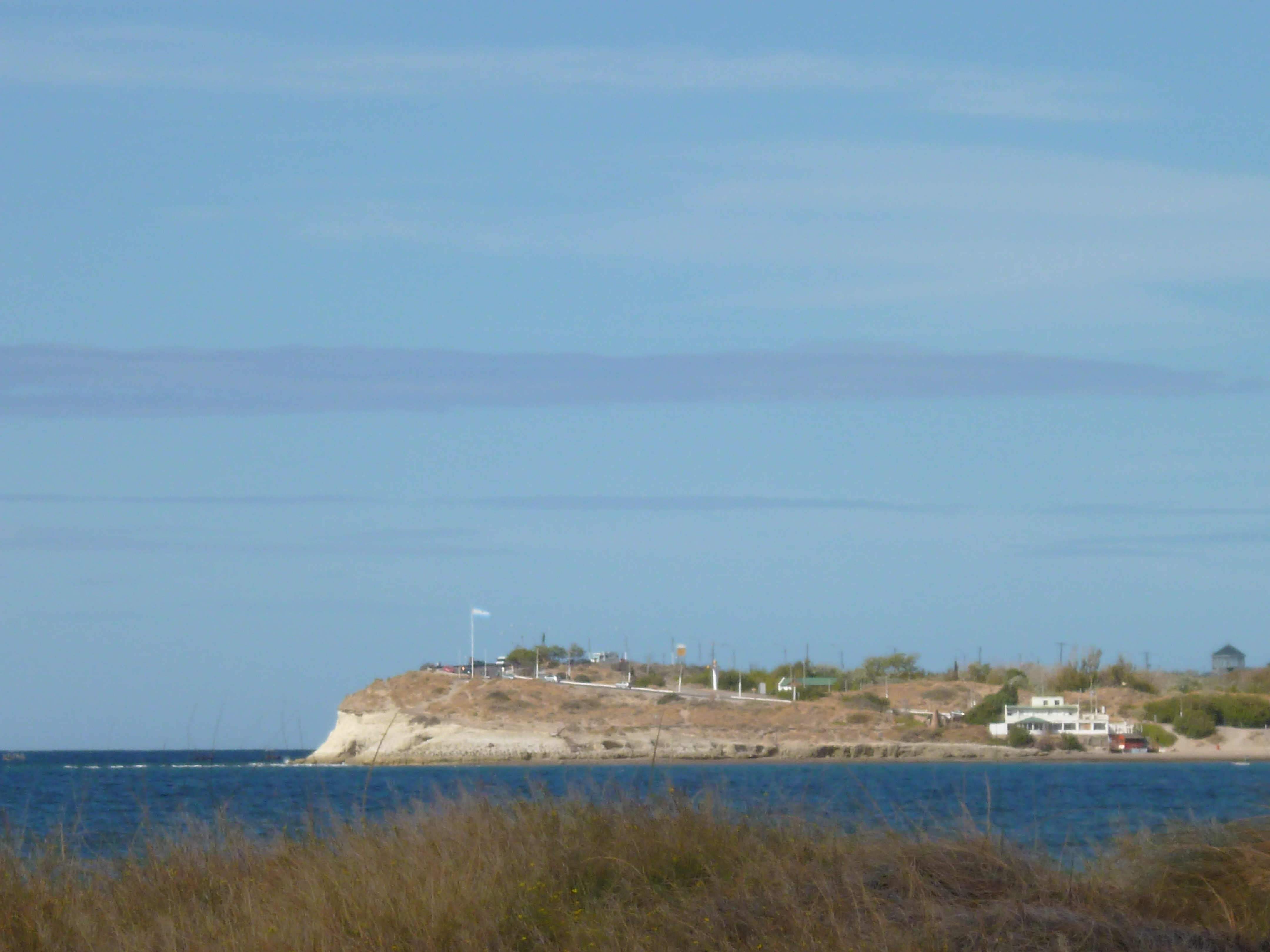 Punta Cuevas, Puerto Madryn, Argentina, lugar donde llegaron los colonos galeses